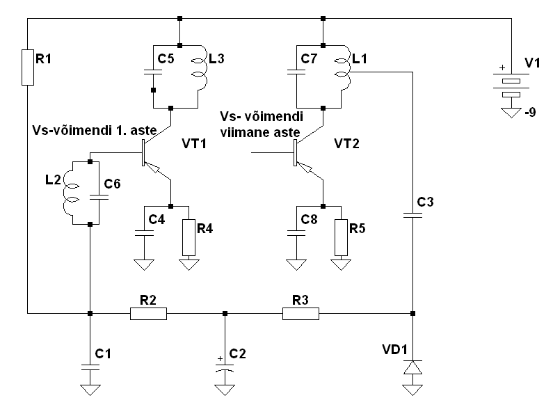 AVR alalisvoolurežiimi muutmisega võimenduse kontroll, kus kollektorvool väheneb